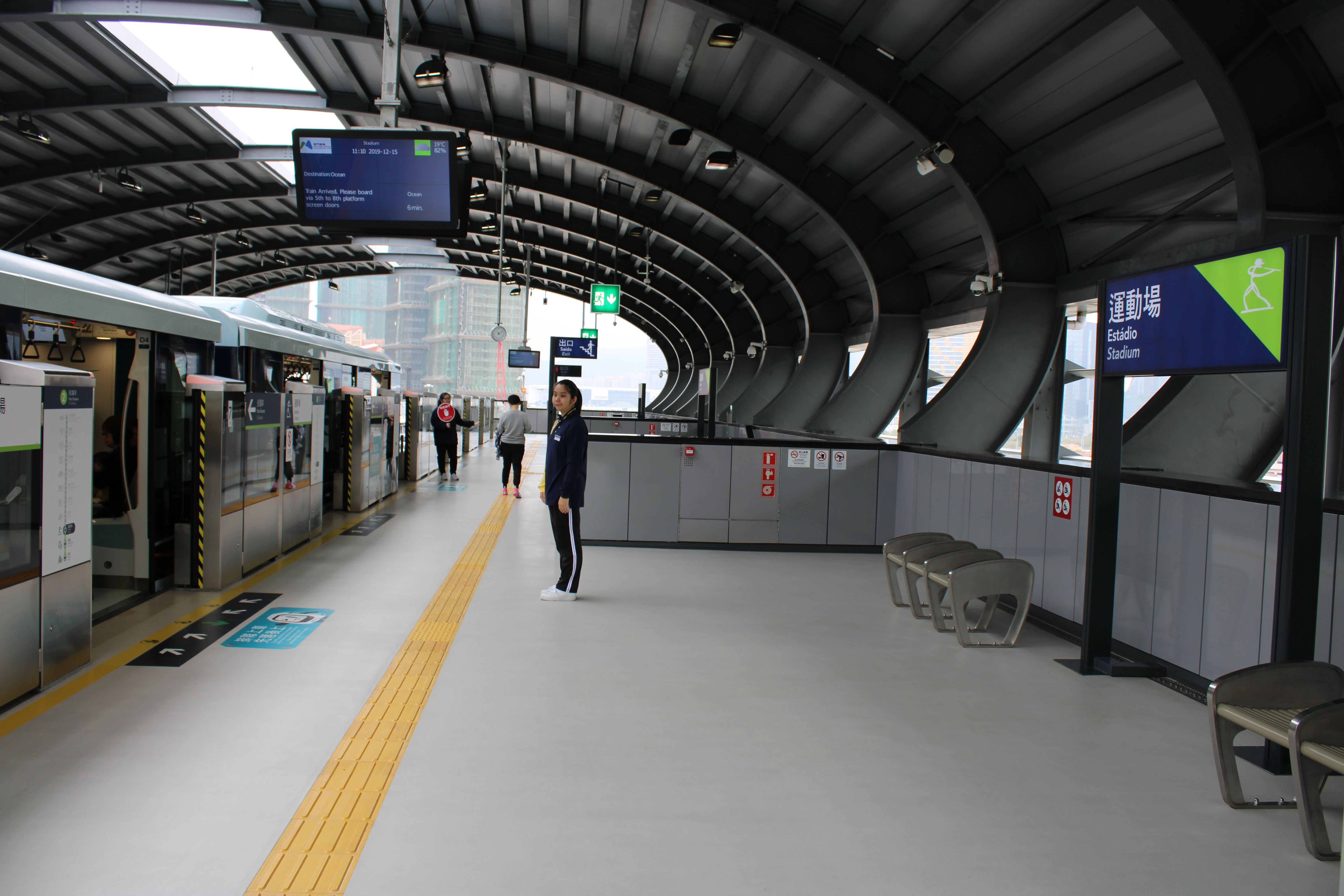 2019年12月的澳門輕軌氹仔線運動場站月臺。